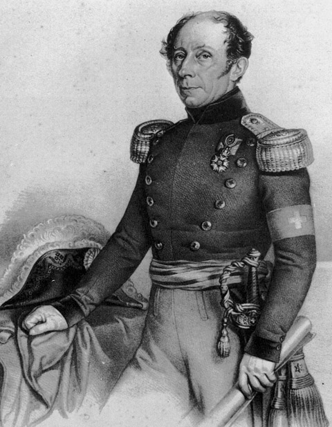 Guillaume-Henri Dufour (1787–1875), Schweizer Militär, General der Bundestruppen im Sonderbundskrieg